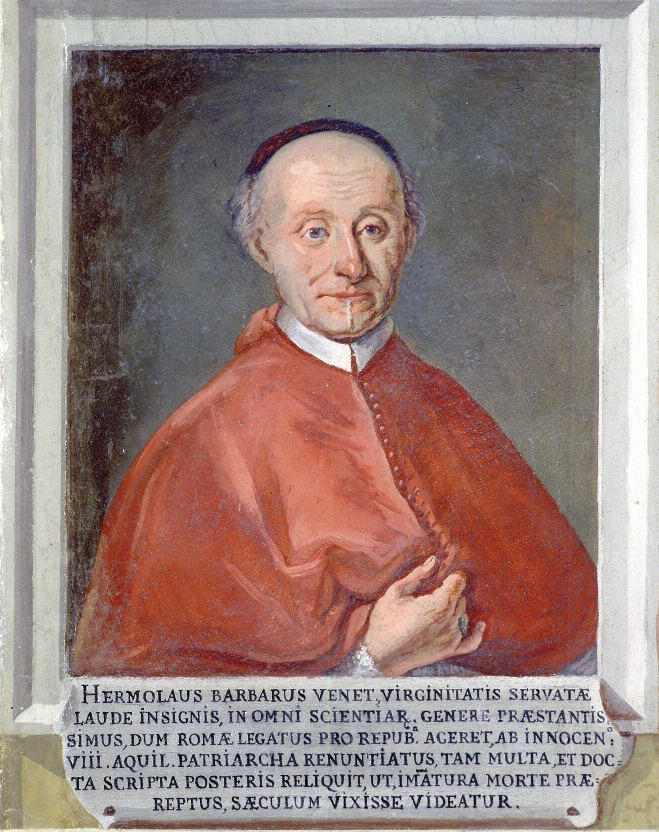 Ritratto del patriarca Ermolao Barbaro - Udine, Museo diocesano e gallerie del Tiepolo